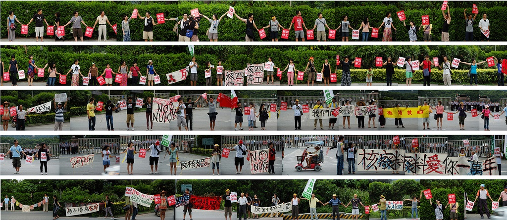 2010年8月30日